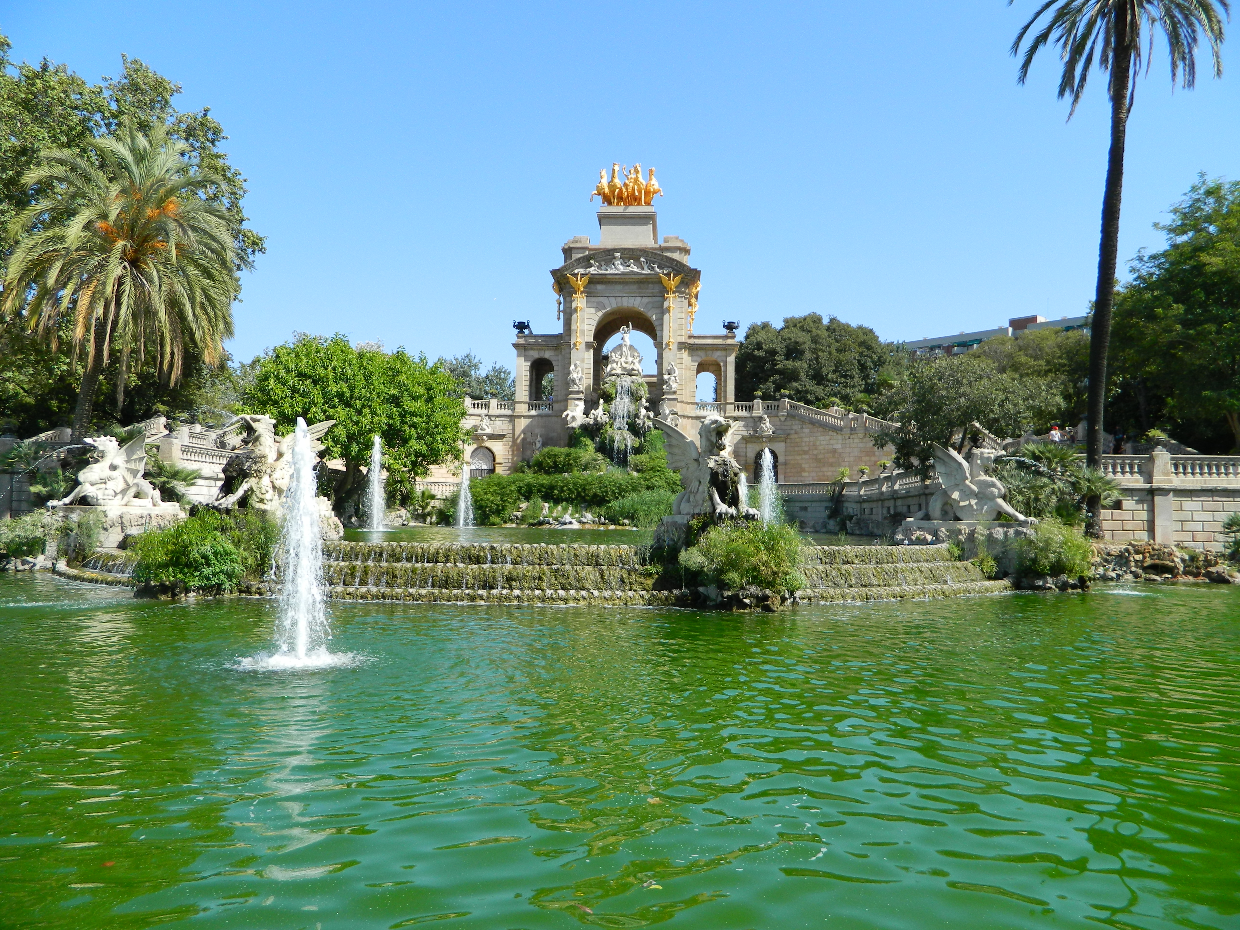 Barcelona